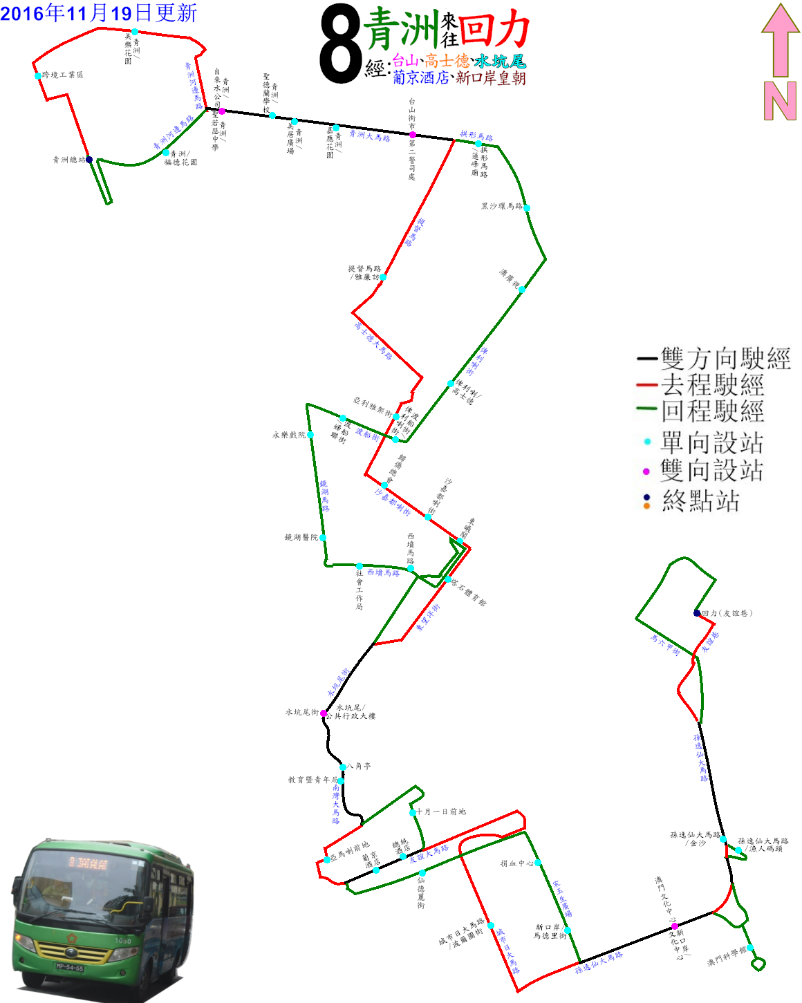 中文（香港）: 澳門巴士8號線的走線圖